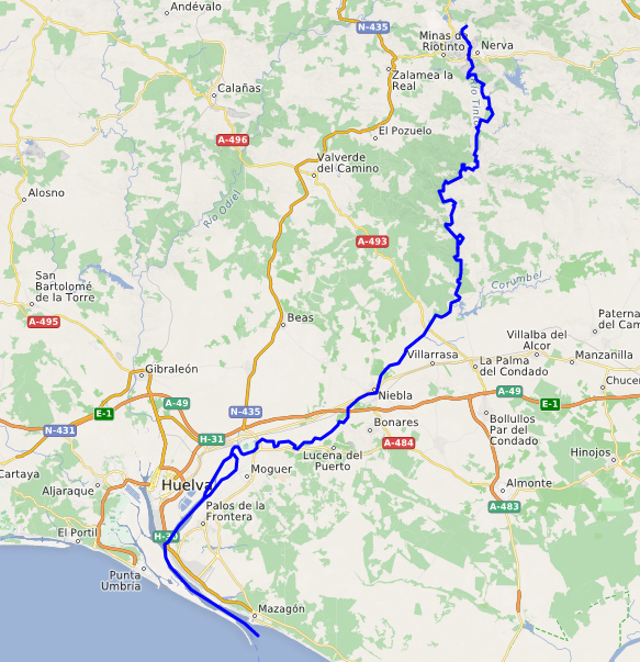 carte réalisée sur umap This map may be incomplete, and may contain errors. Don't rely solely on it for navigation.